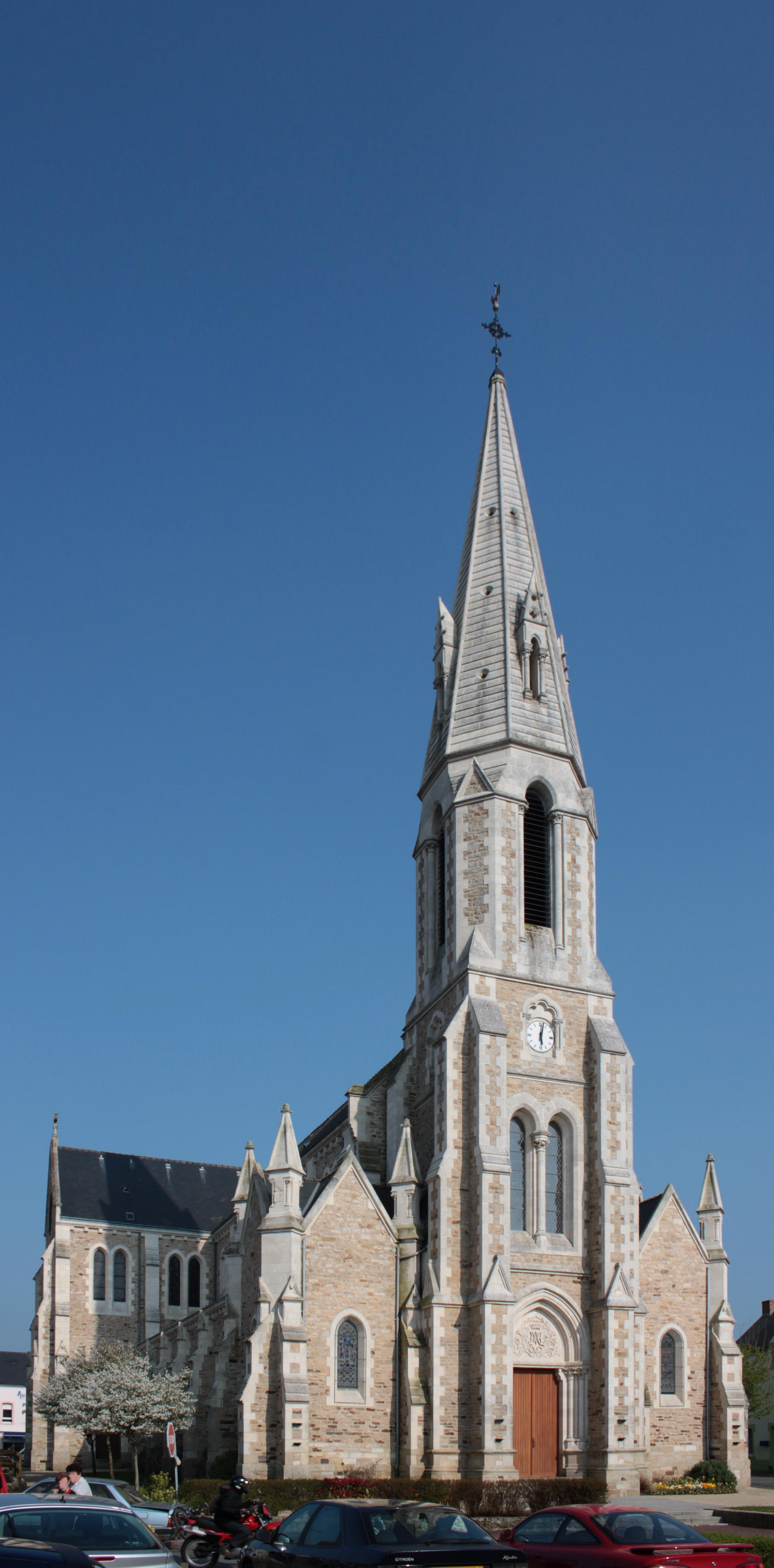 Église Immaculée Conception, Fr-56-Saint-Dolay.